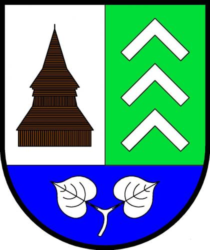 znak, Vilantice, okres Trutnov